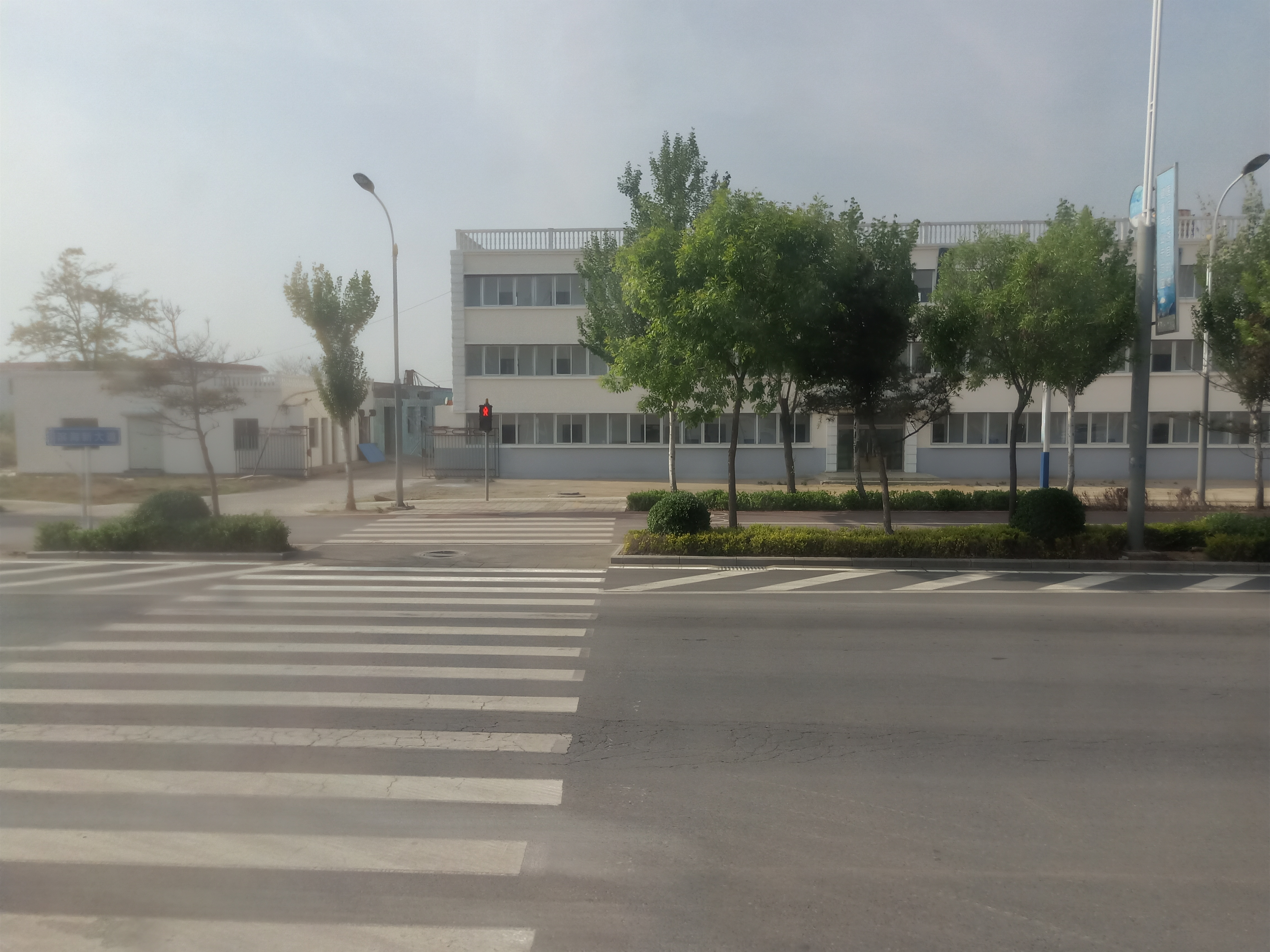 粵語: 河北秦皇島昌黎縣濱海新大道